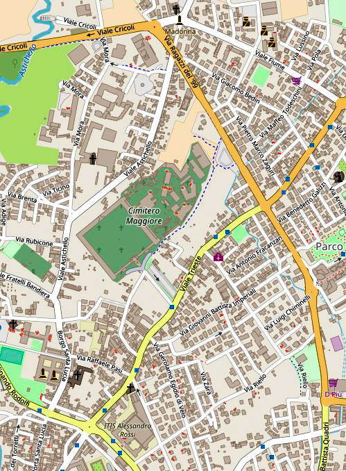 Quartiere Araceli di Vicenza